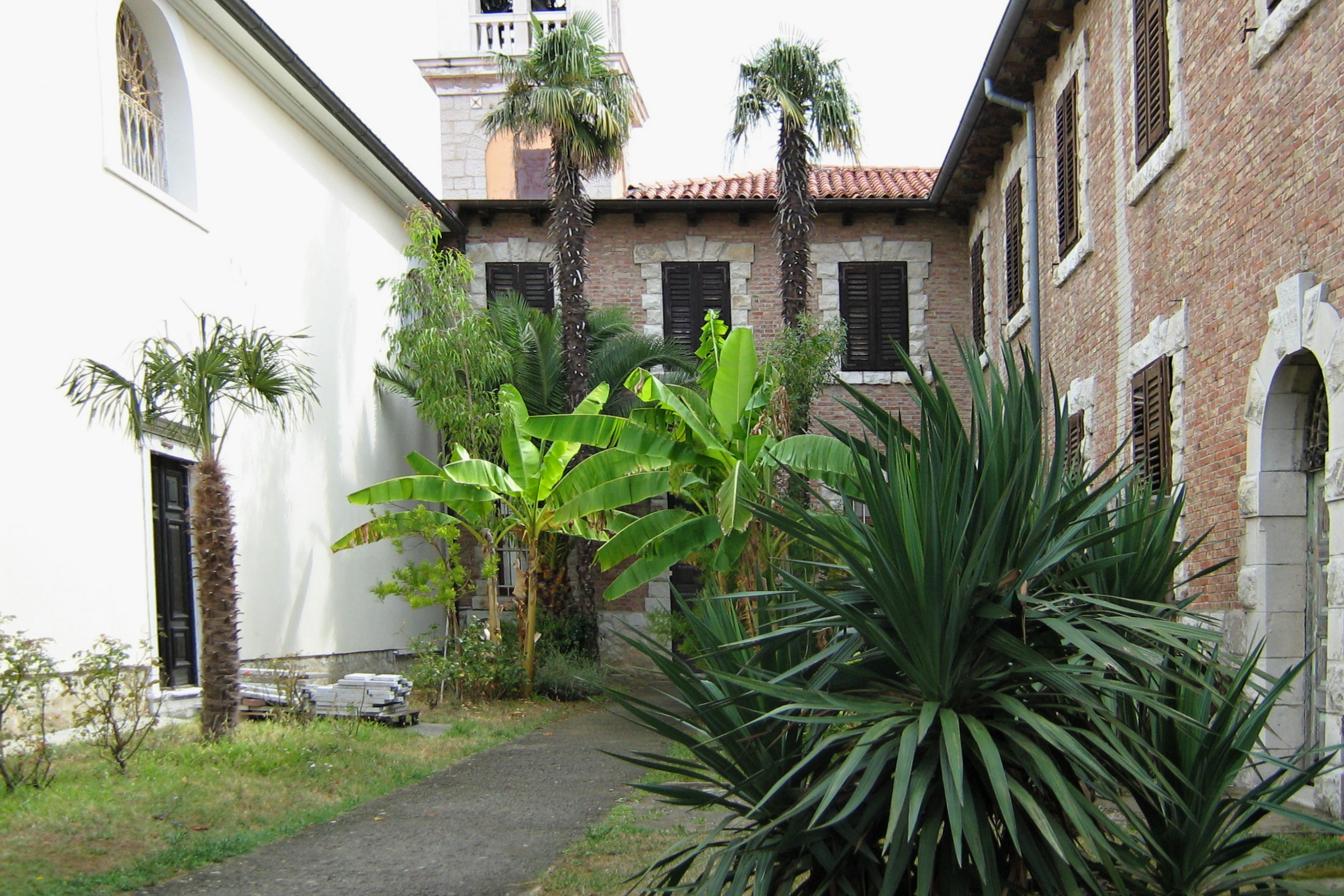 Farní kostel Zjevení Matky Boží v obci Strunjan